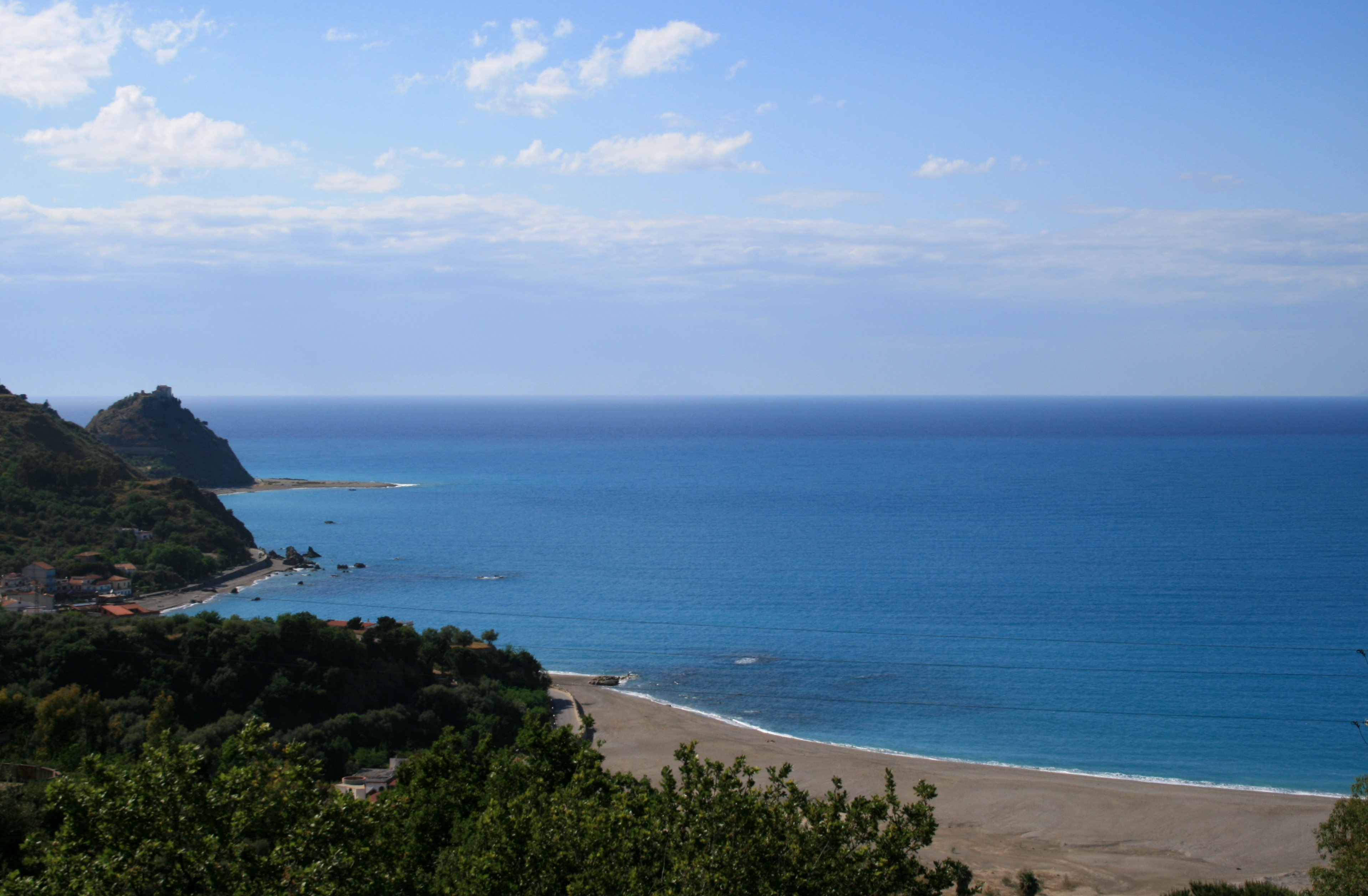 scorcio d'azzurro